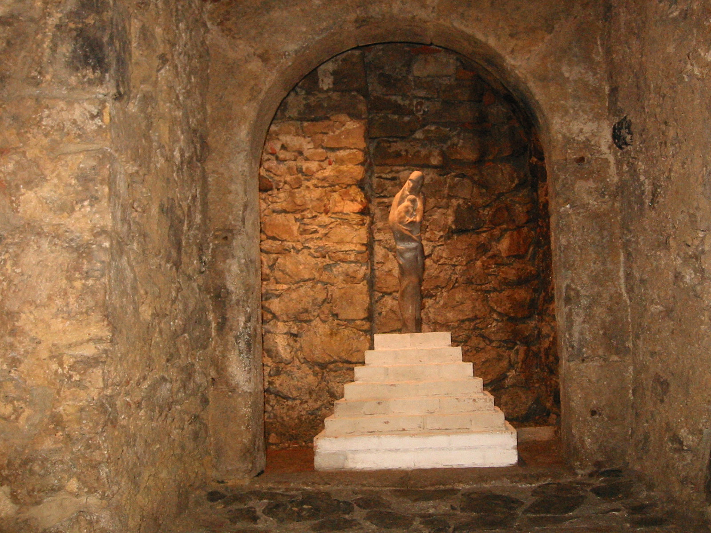 Johanitská komenda v Českém Dubu